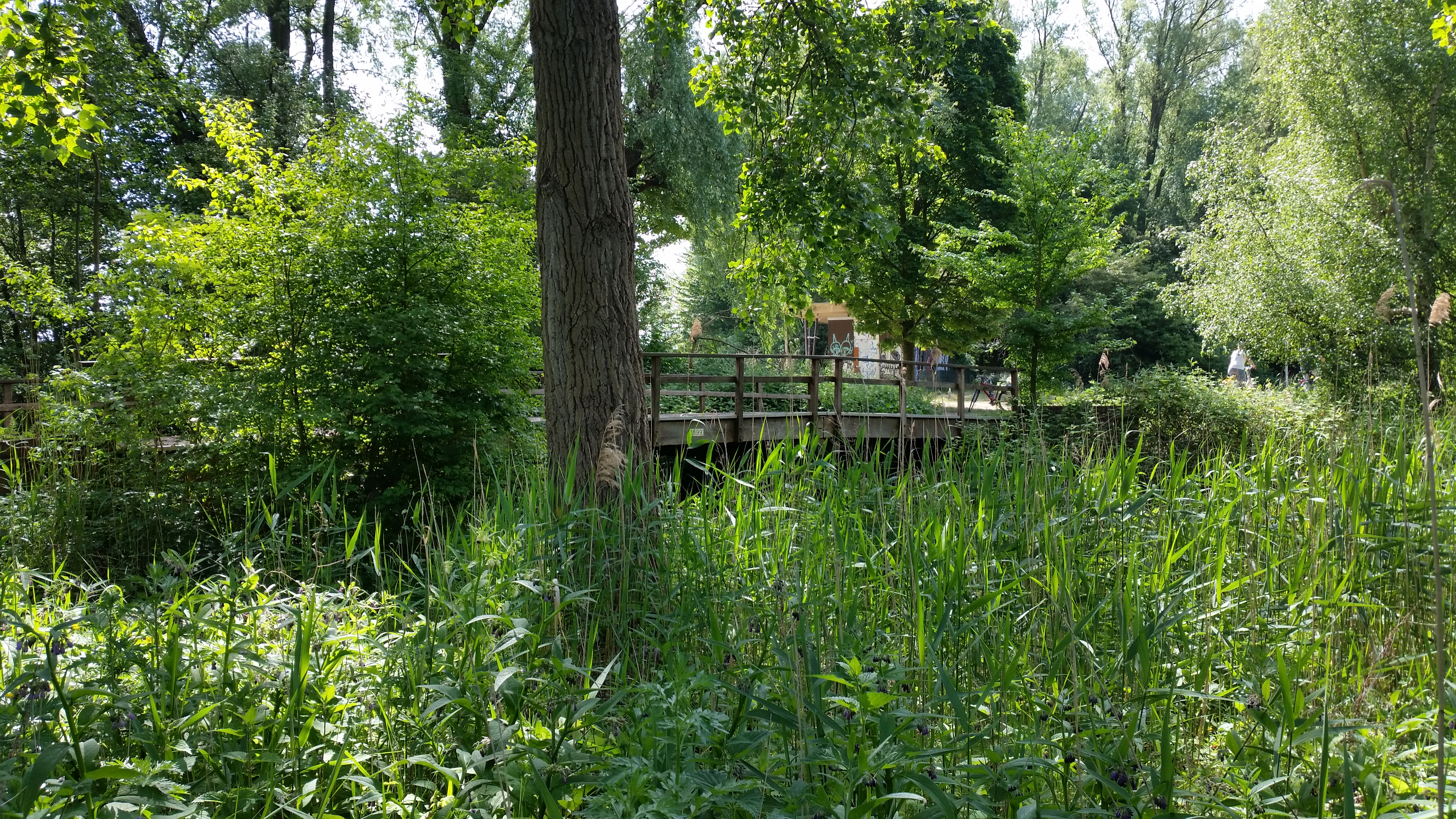 Impressie van Brug 1899 in het Anton Schleperpad in De Oeverlanden (mei 2020)